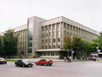 Белгут